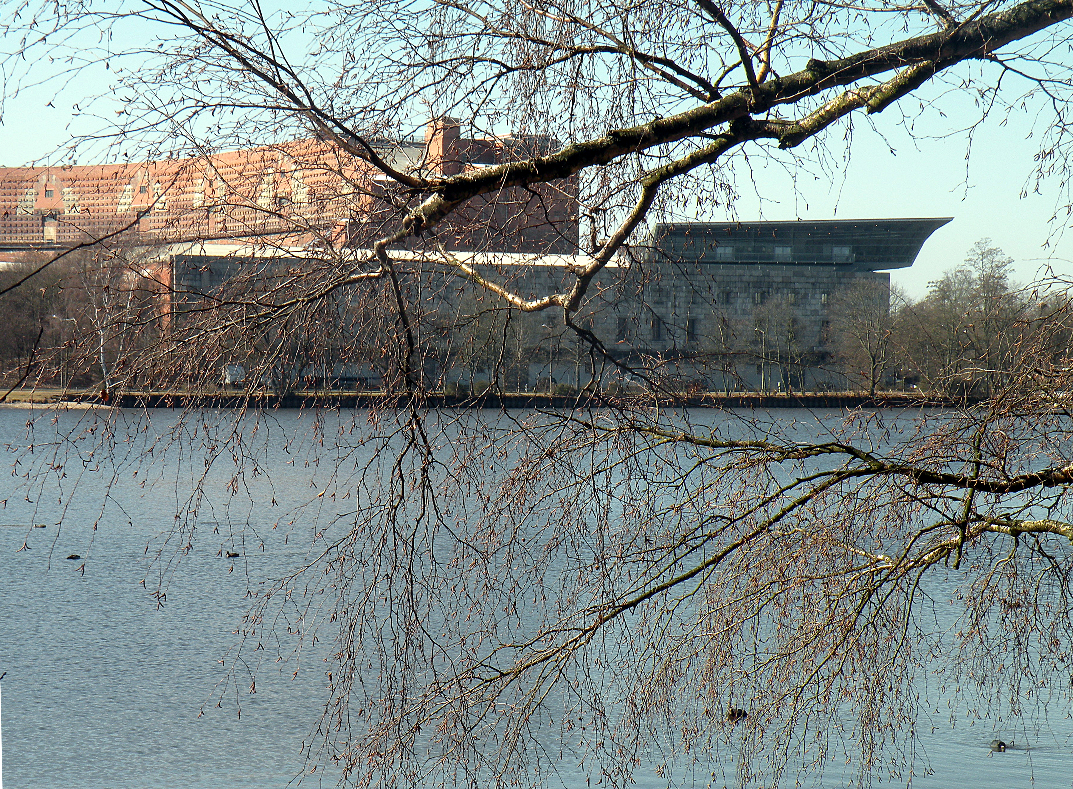 Докуцентр со стороны пруда.